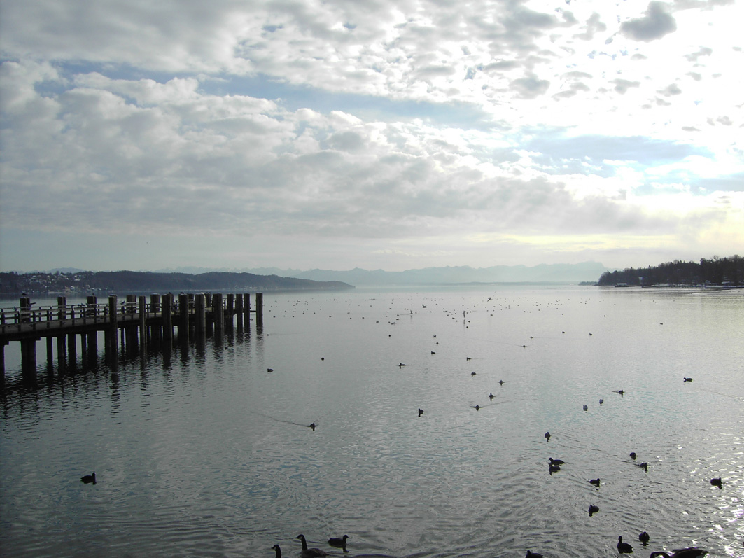 Starnberger See, An der Uferpromenade in Starnberg, im Hintergrund die Alpen mit der Zugspitze